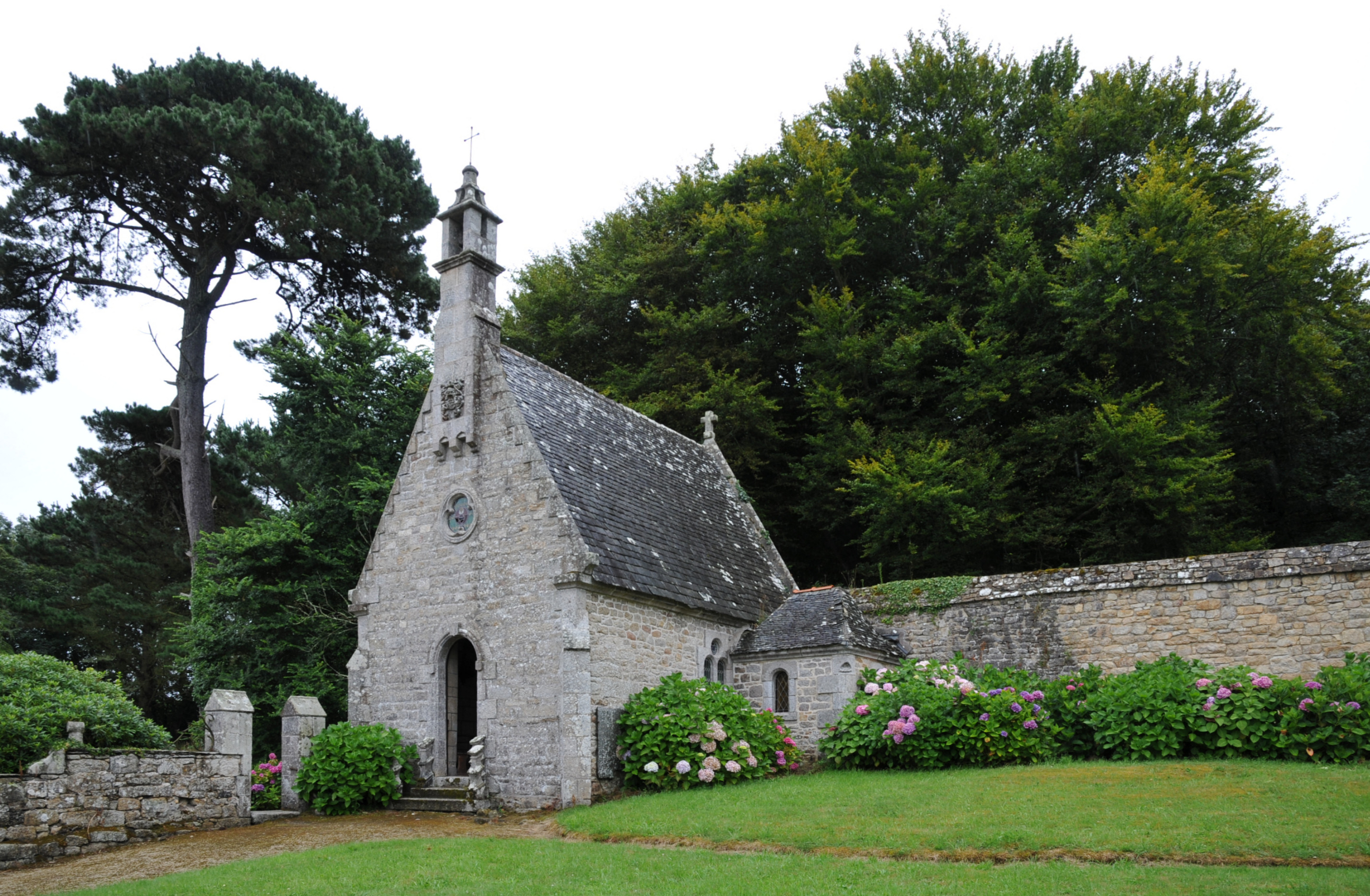 Manoir de Tronjoly, Schlosskapelle